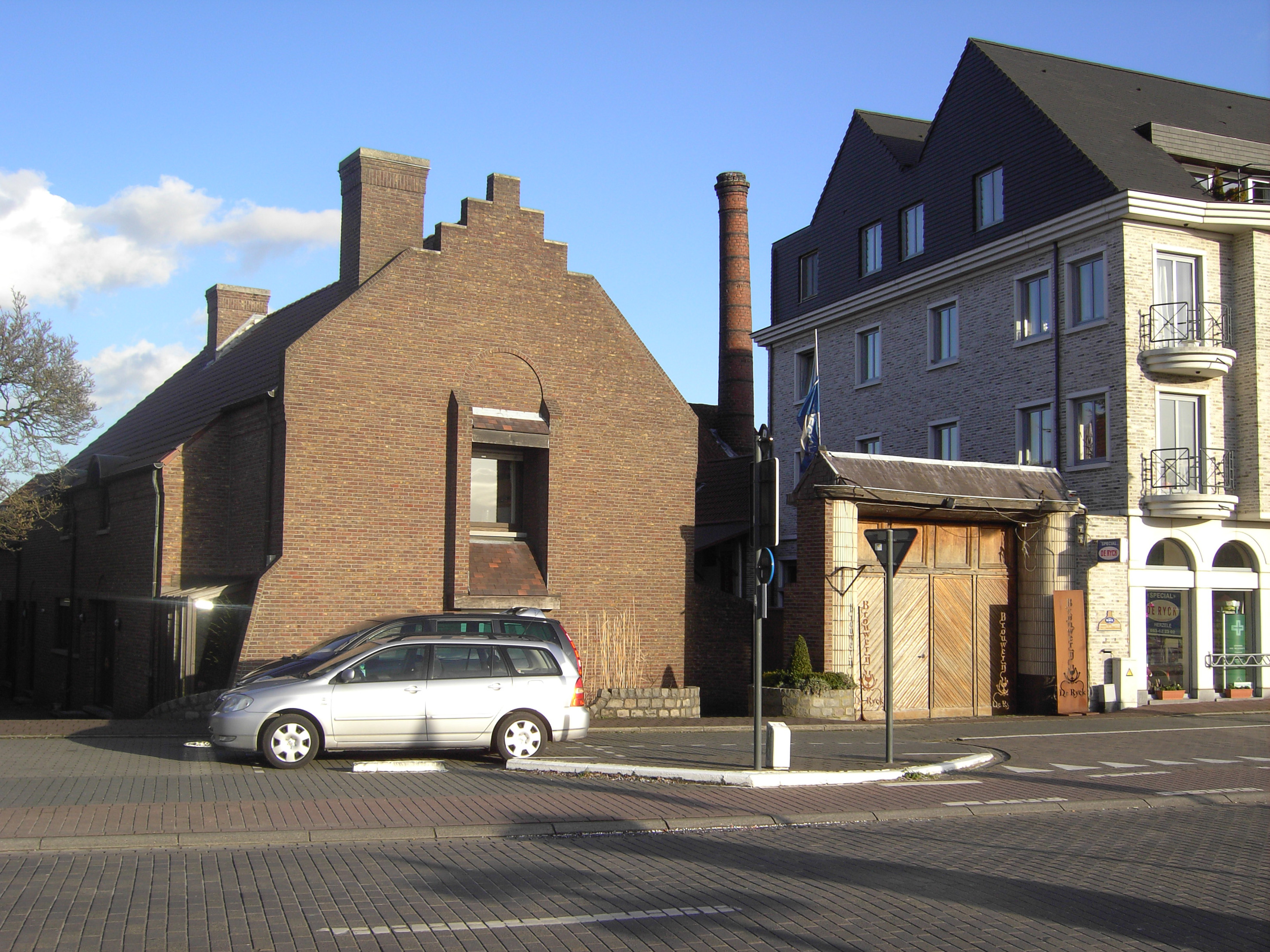 Herzele - Brouwerij De Ryck